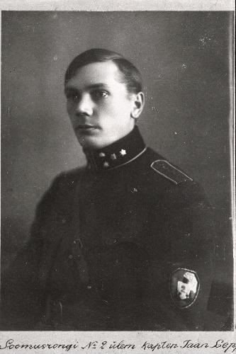 Laiarööpalise soomusrongi nr 2 ülem kapten Jaan Lepp aastal 1920. Karl Hugo Akeli (1878-1942) foto.